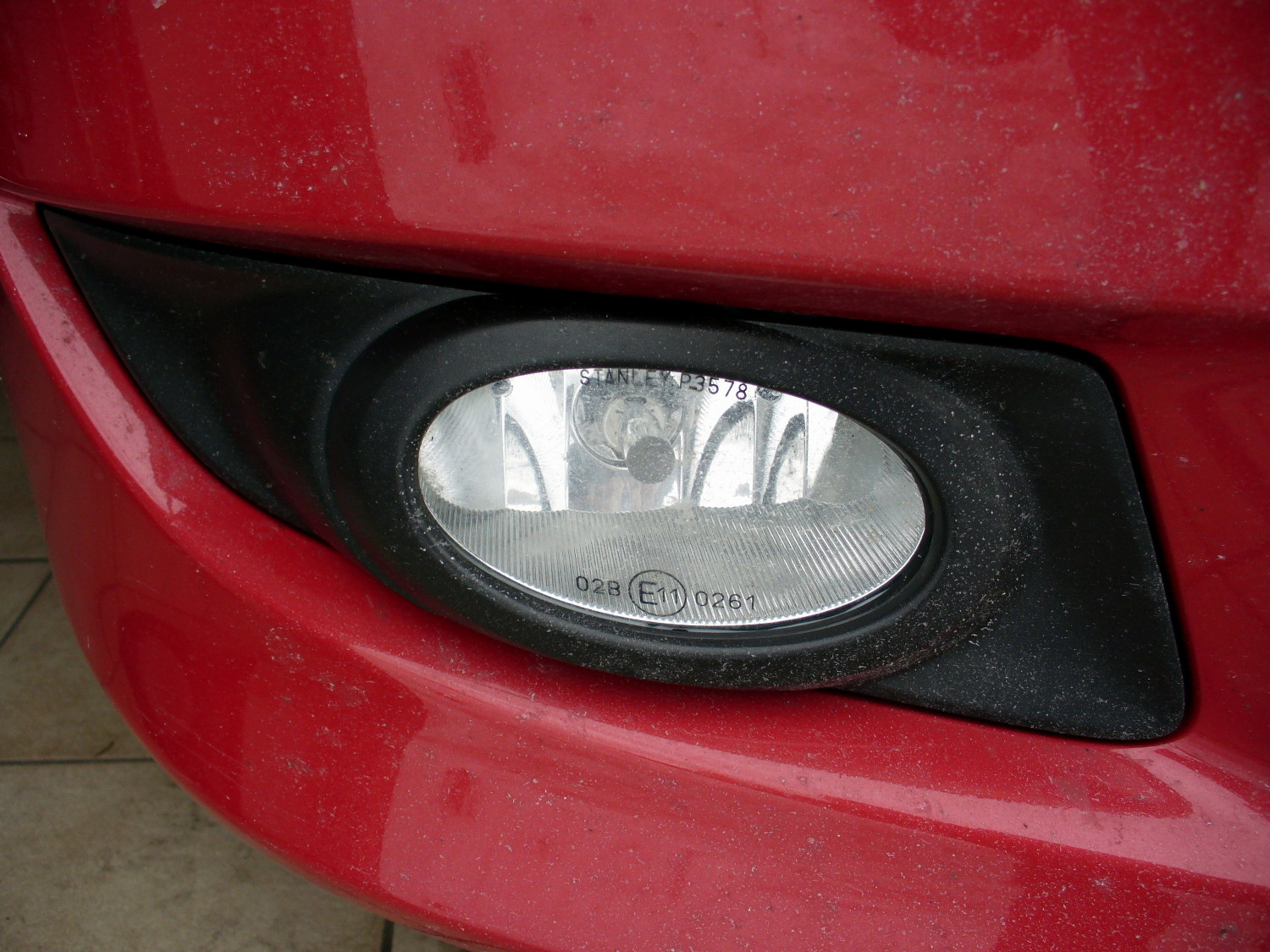 Nebelleuchte Mazda3